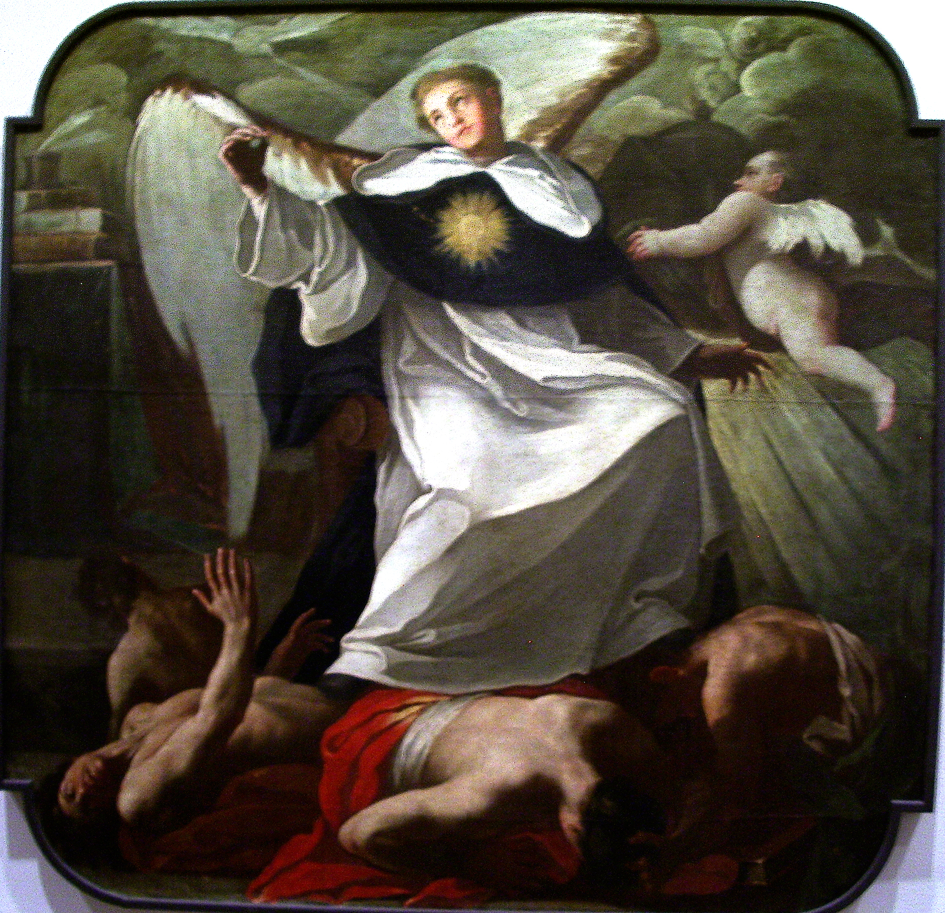 La obra representa al teólogo dominico Santo Tomás de Aquino derrotando a los herejes.